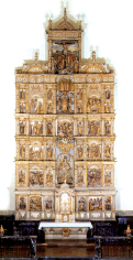 Markina-Xemeingo Andre Mariaren erretaula nagusia